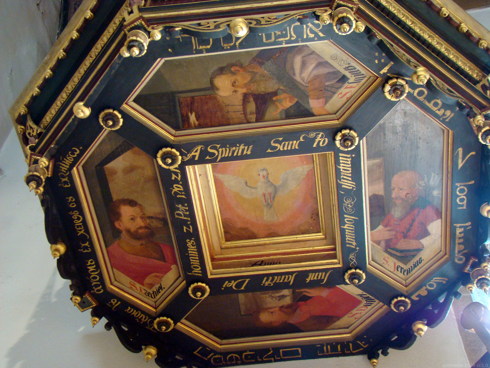 Detail aus der Stadtkirche St. Jakobus in Brackenheim: Ansicht des Schalldeckels der Kanzel von unten.